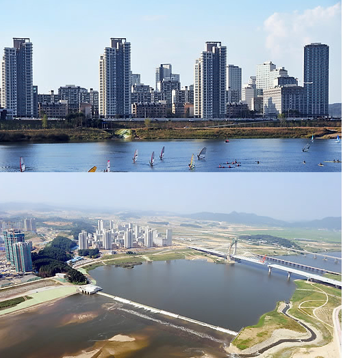 Sejong City